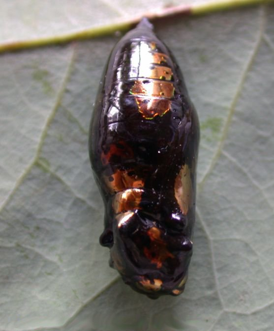 Idea malabarica pupa, India